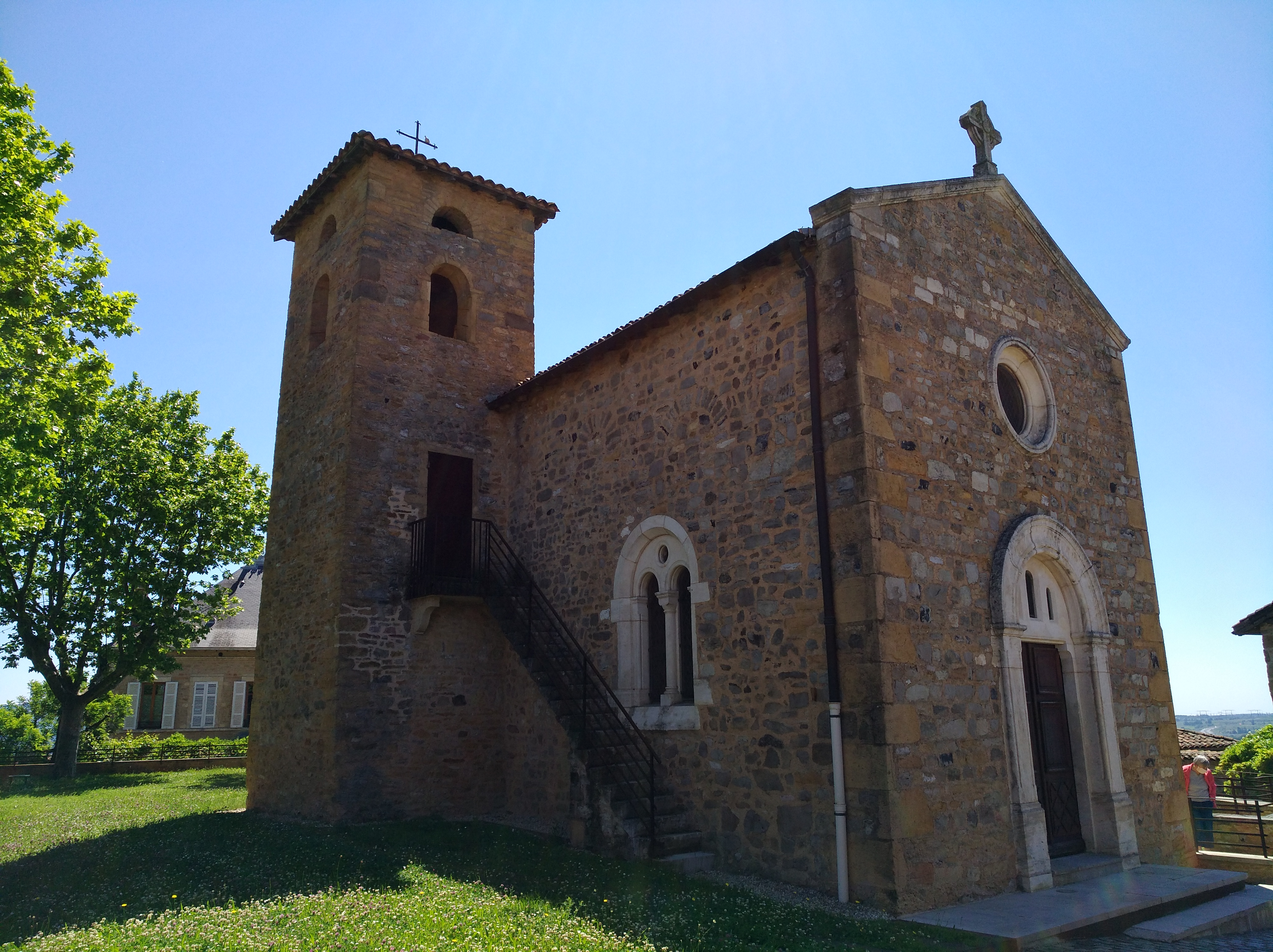 Église Saint-Julien de Belmont-d'Azergues, dans le département du Rhône, en France.